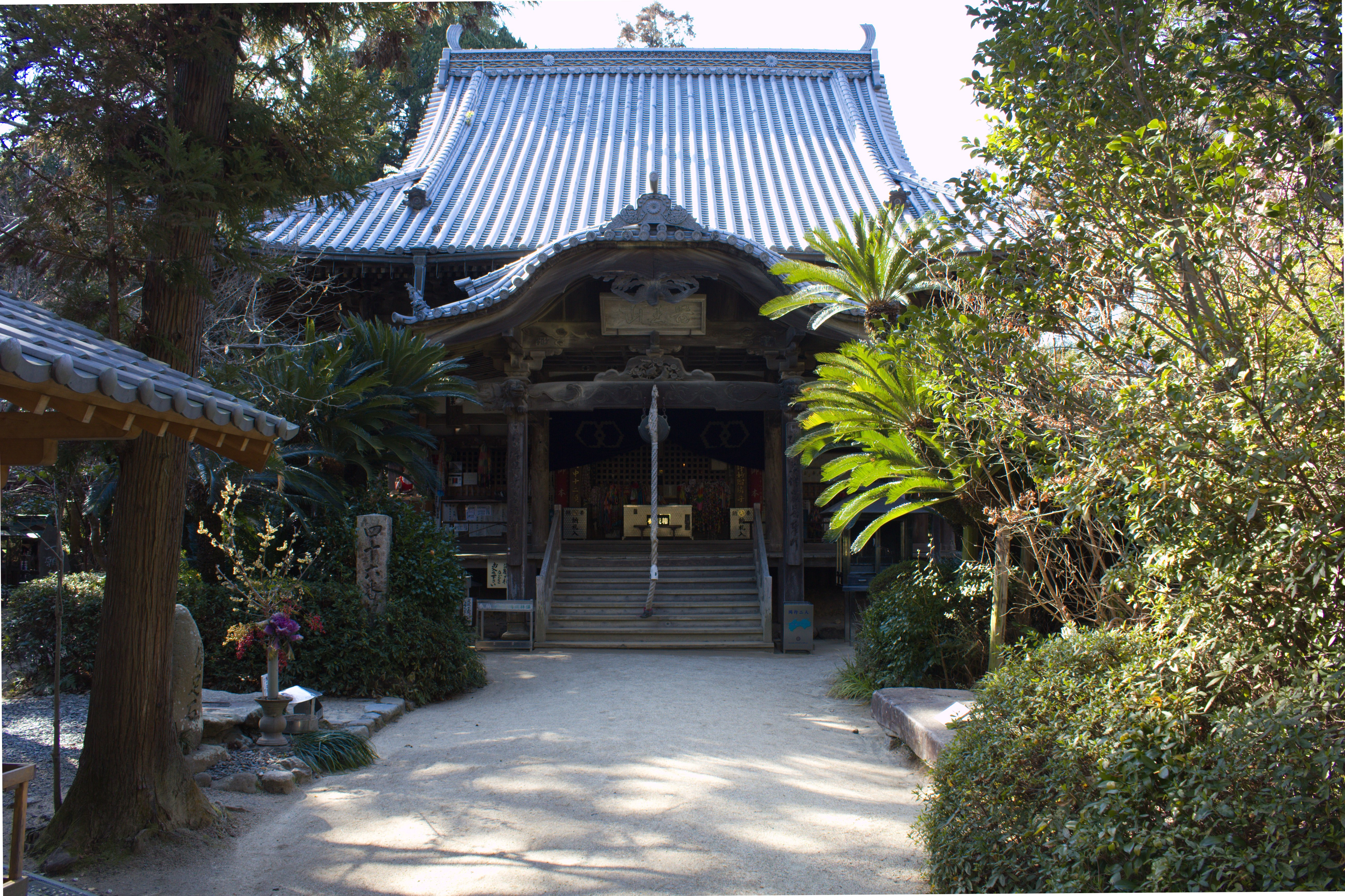 Jyoururi-ji temple